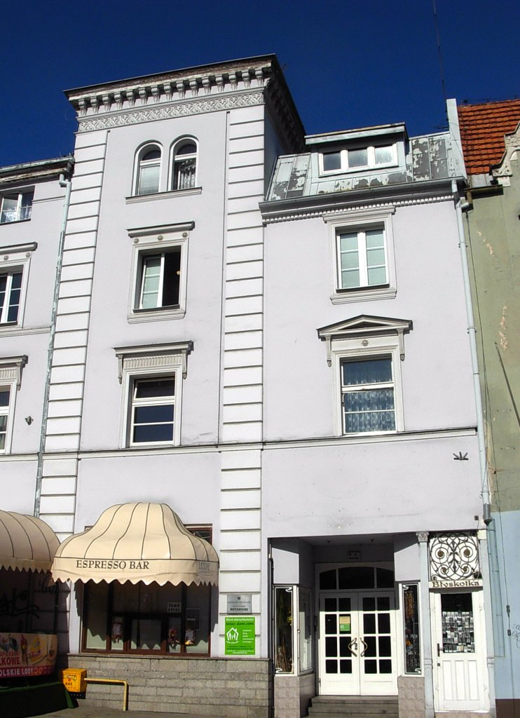 Kamienica Stary Rynek 7 - Mostowa 1 w Bydgoszczy. Widok od ul. Mostowej.